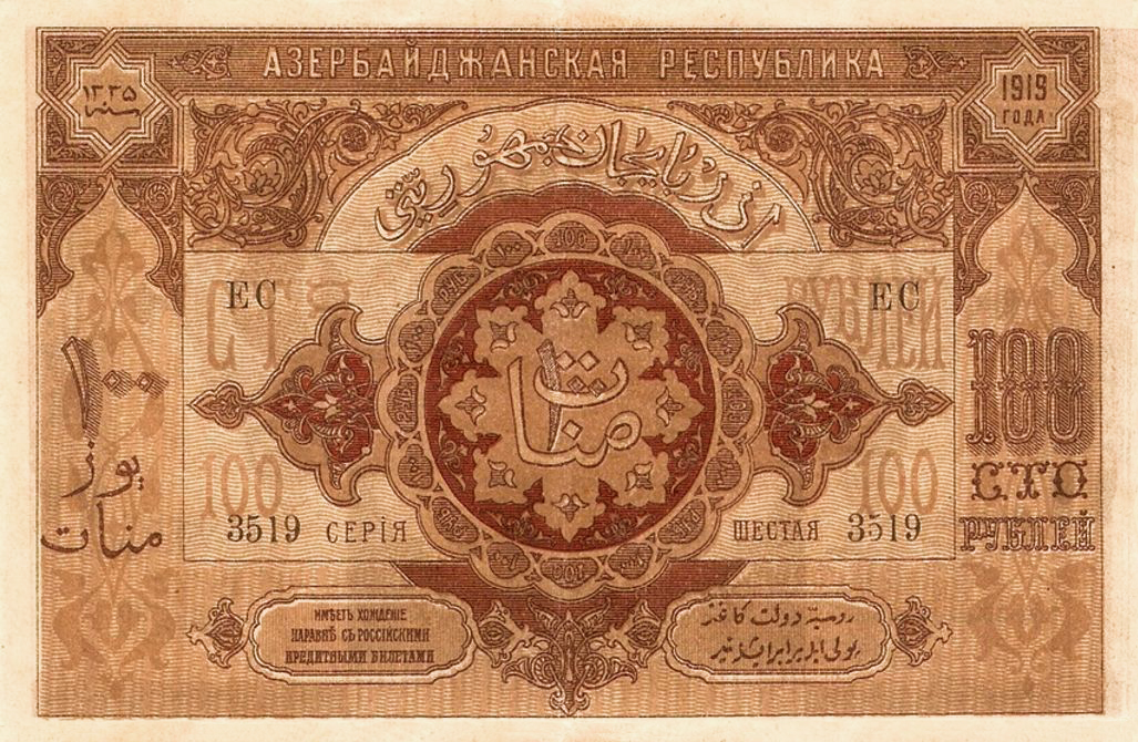 Azərbaycan Demokratik Respublikası 100 manatlıq əskinas 1919-cu il